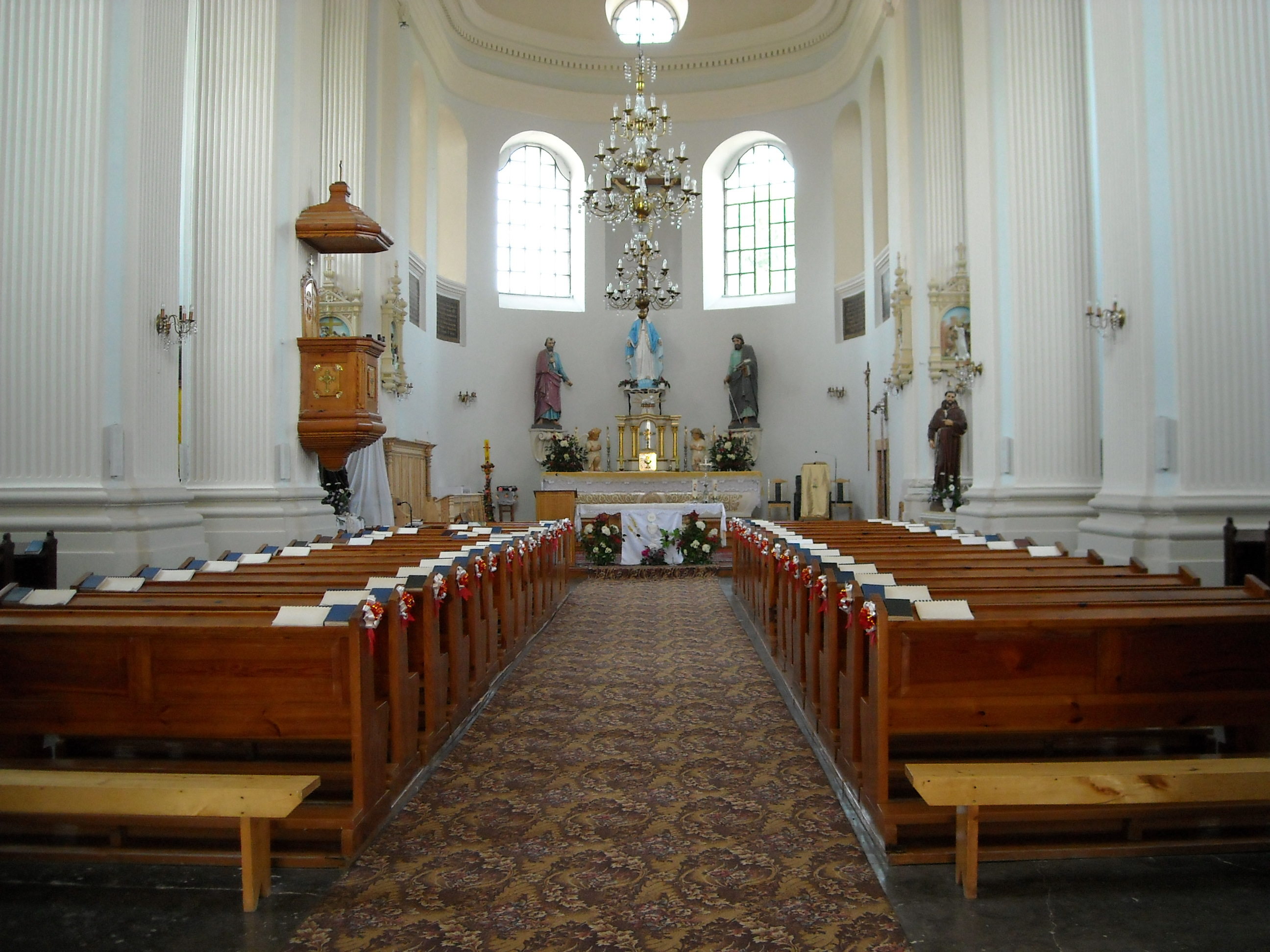 Беларуская (тарашкевіца): Касьцёл Беззаганага Зачацьця Найсьвяцейшай Панны Марыі. в. Удзела This is a photo of Belarusian heritage monument. Reference number: 212Г000417 ( WLM)